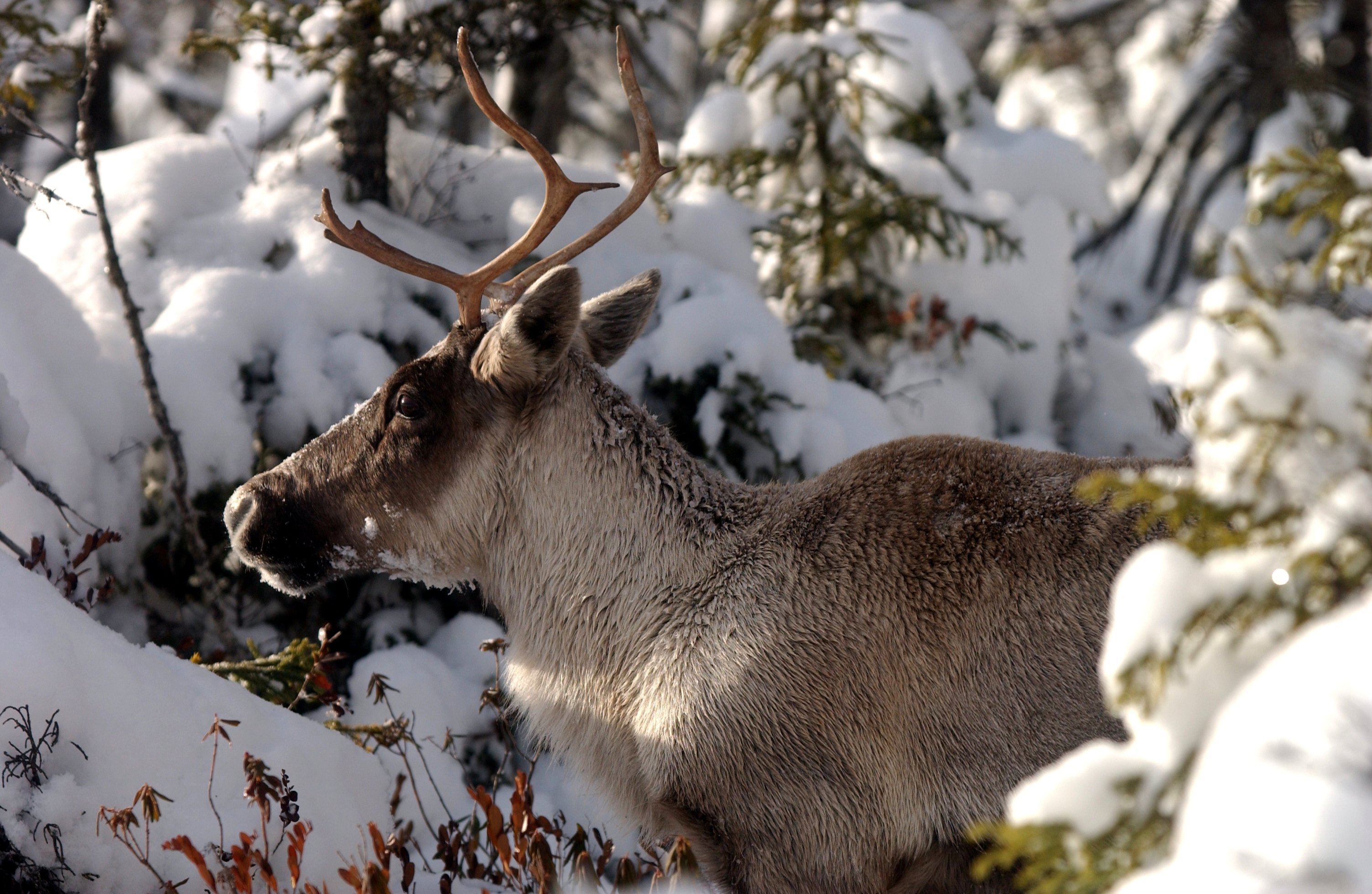 Il est possible de les voir très proches lors de cette migration.